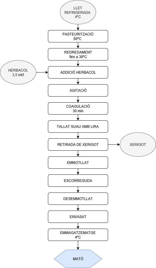 Driagrama de flux de mató de coagulació enzimàtica amb quall vegetal